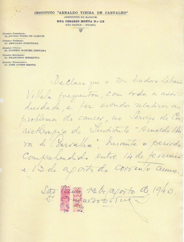 Certificado de Conclusão de Cursos de Especialização efetuado no período de 13 de fevereiro a 13 de agosto de 1940 pelo Dr. Eudoro Villela no Instituto Arnaldo Vieira de Carvalho.